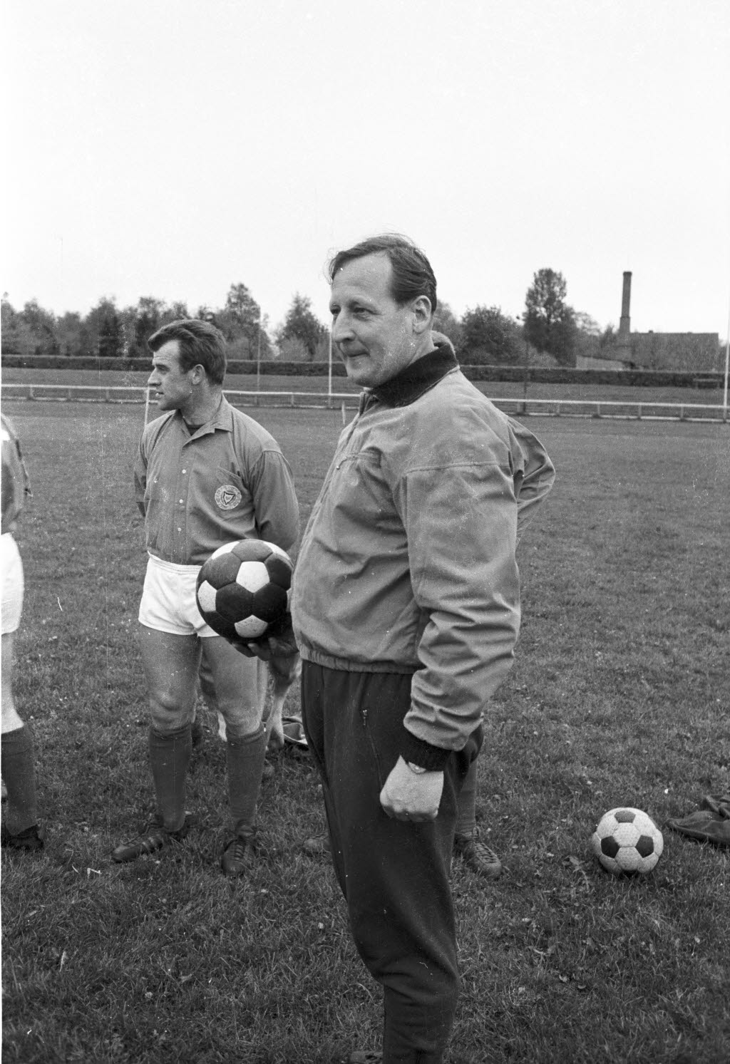 Neuer Trainer von Holstein Kiel seit der Aufstiegsrunde zur 1. Fußball-Bundesliga in der Saison 1964/1965. Im Hintergrund links Fußballspieler Günter Tams.